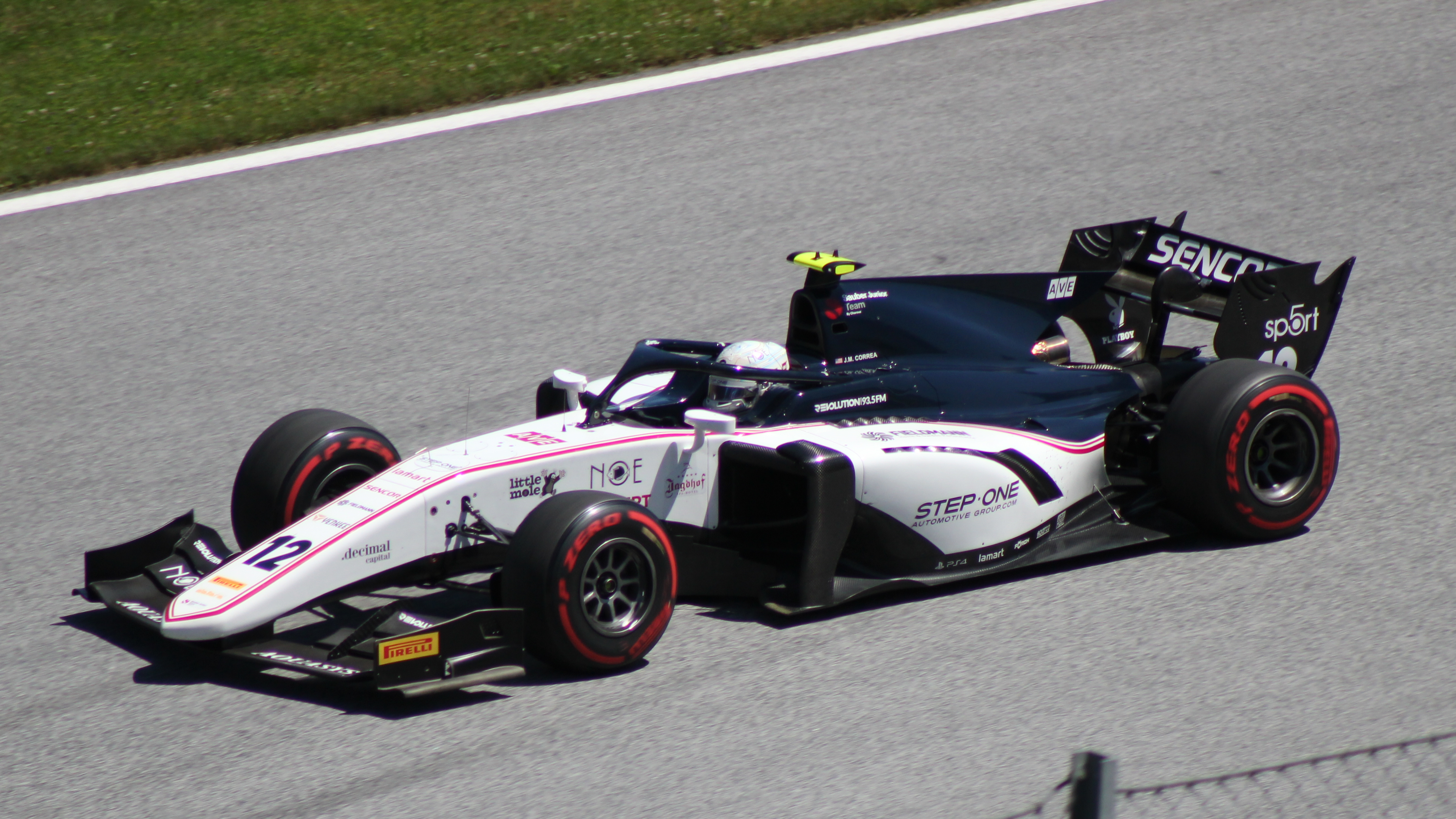 Correa beim Rennwochenende in Österreich 2019